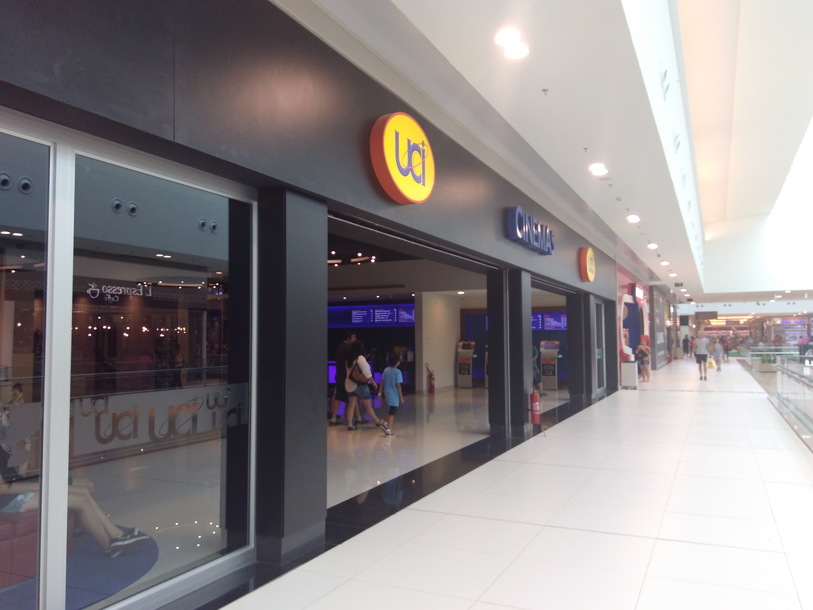 Vista lateral da entrada do UCI Park Shopping de Canoas, RS